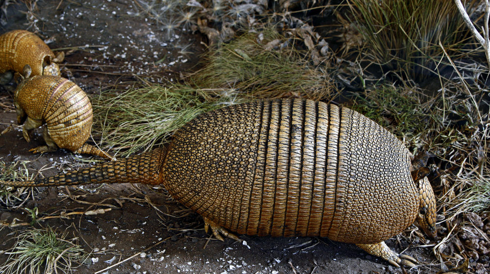 Museo de Ciencias Naturales de La Plata - Argentina